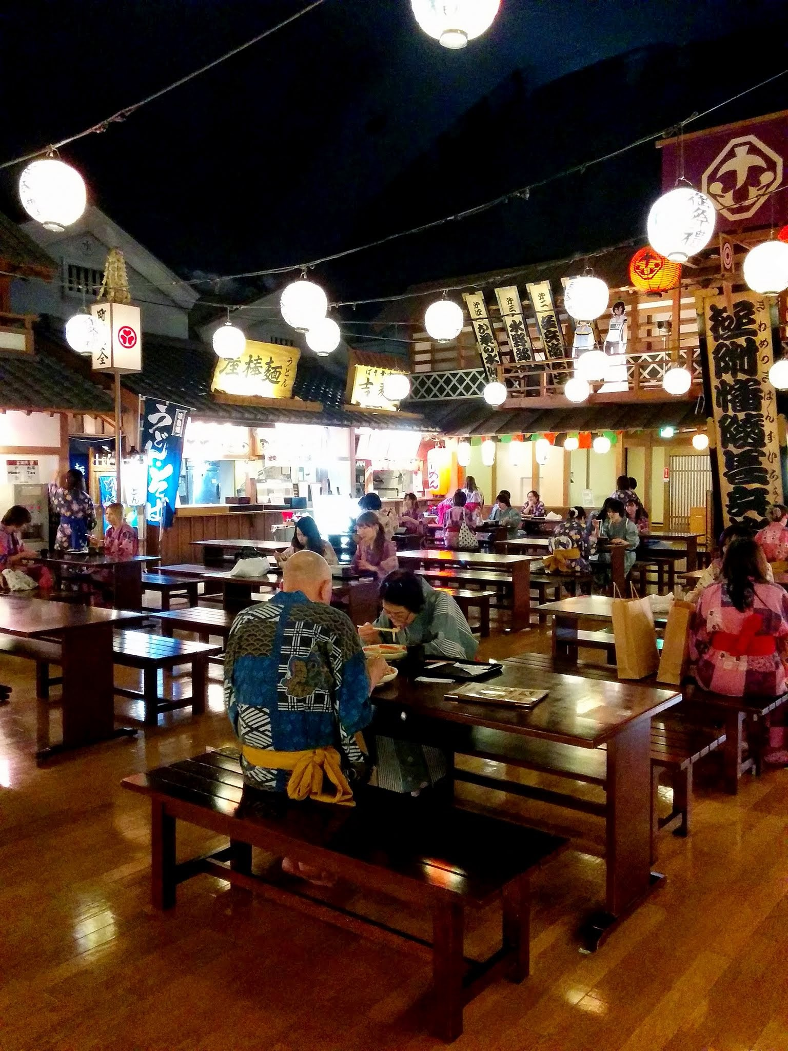 Japanisches Bad Ooedo Onsen Monogatari in Odaiba in Tokio This work by Ronny Siegel is licensed under a Creative Commons Attribution 4.0 International License. - You can freely use this work, any way you want including altering and/or selling if you call my name on your publication. You can find this picture also on my website